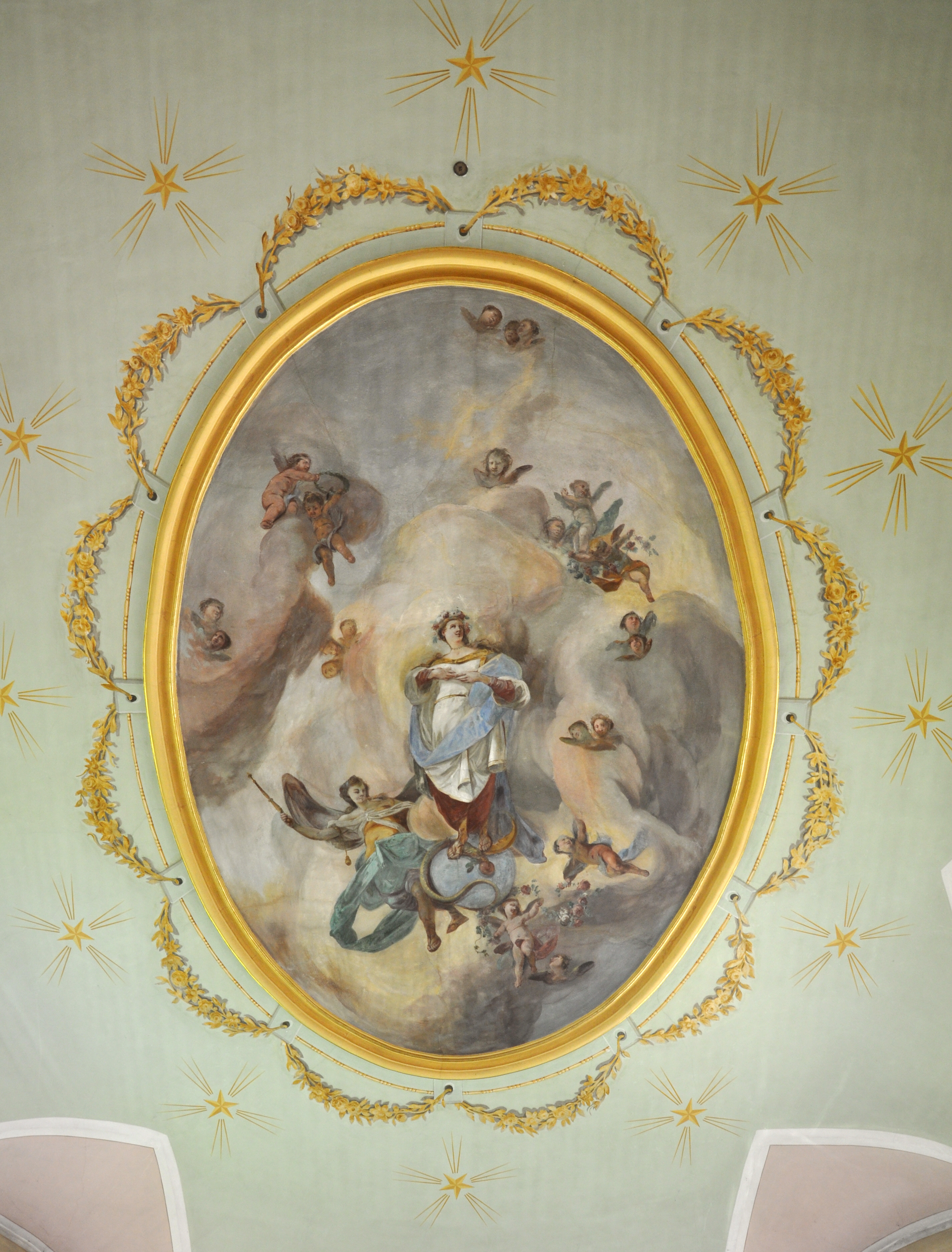 Orsenhausen (Gemeinde Schwendi, Landkreis Biberach), Kath. Pfarrkirche Maria Unbefleckte Empfängnis, Chor, Deckenbild Unbefleckte Empfängnis